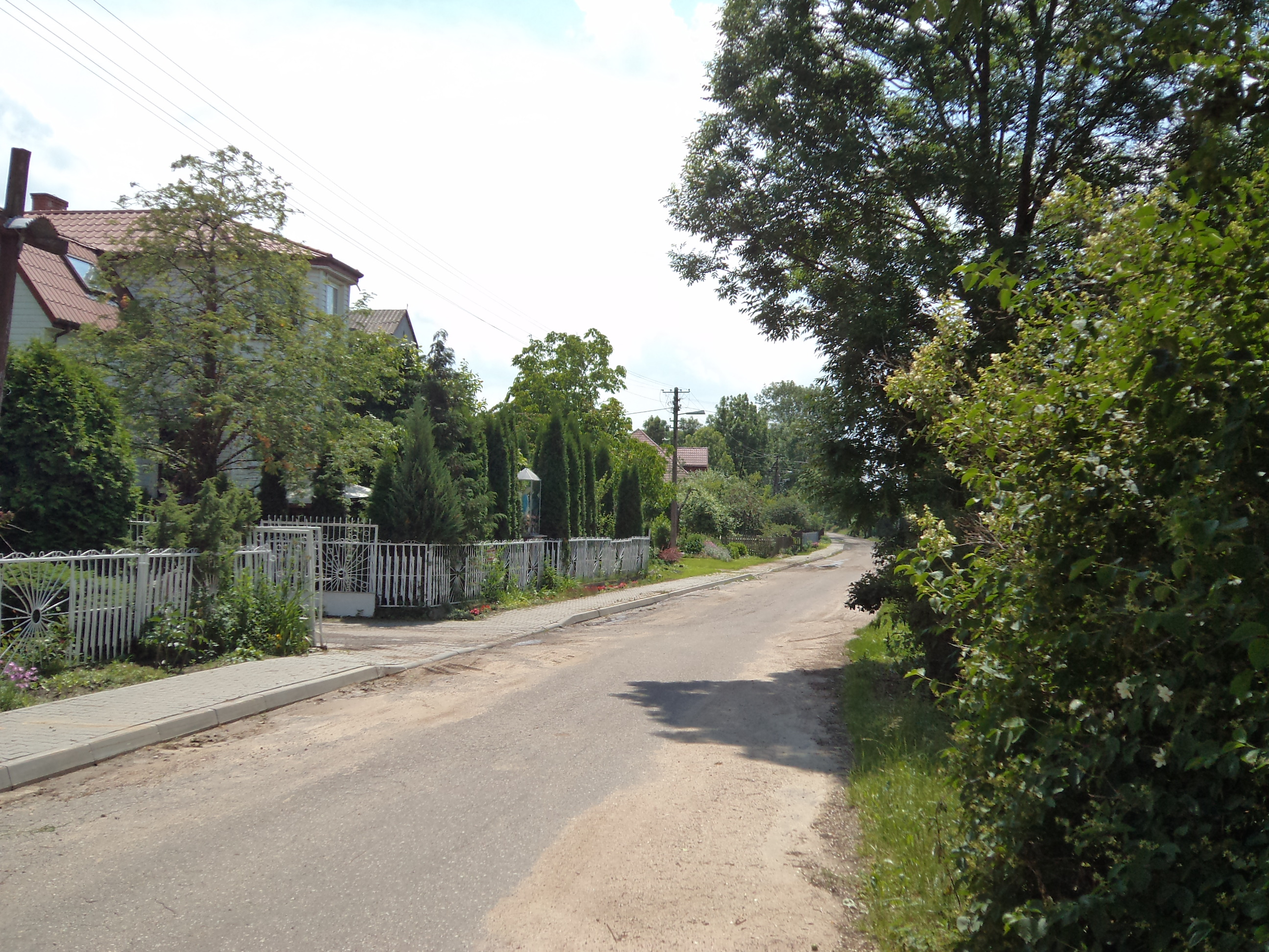 Zabudowania wsi Krasnodęby-Sypytki